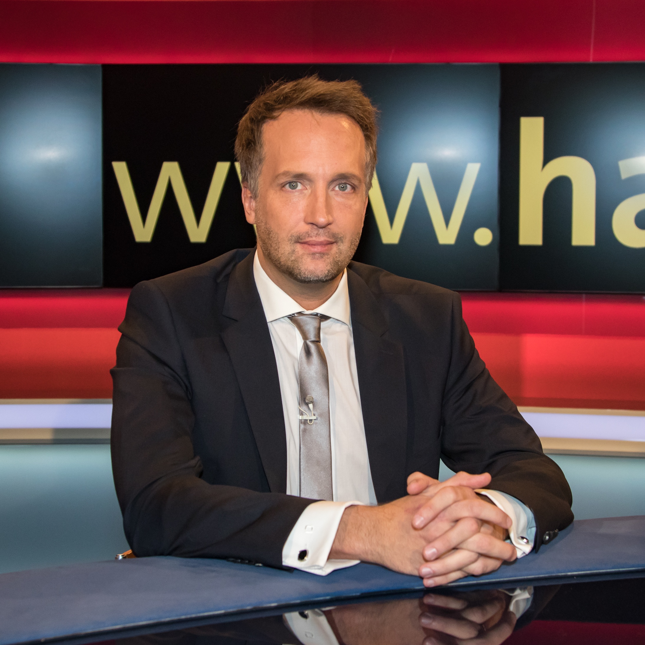 Ralf Höcker in der WDR-Sendung "hart aber fair" am 5.12.2016